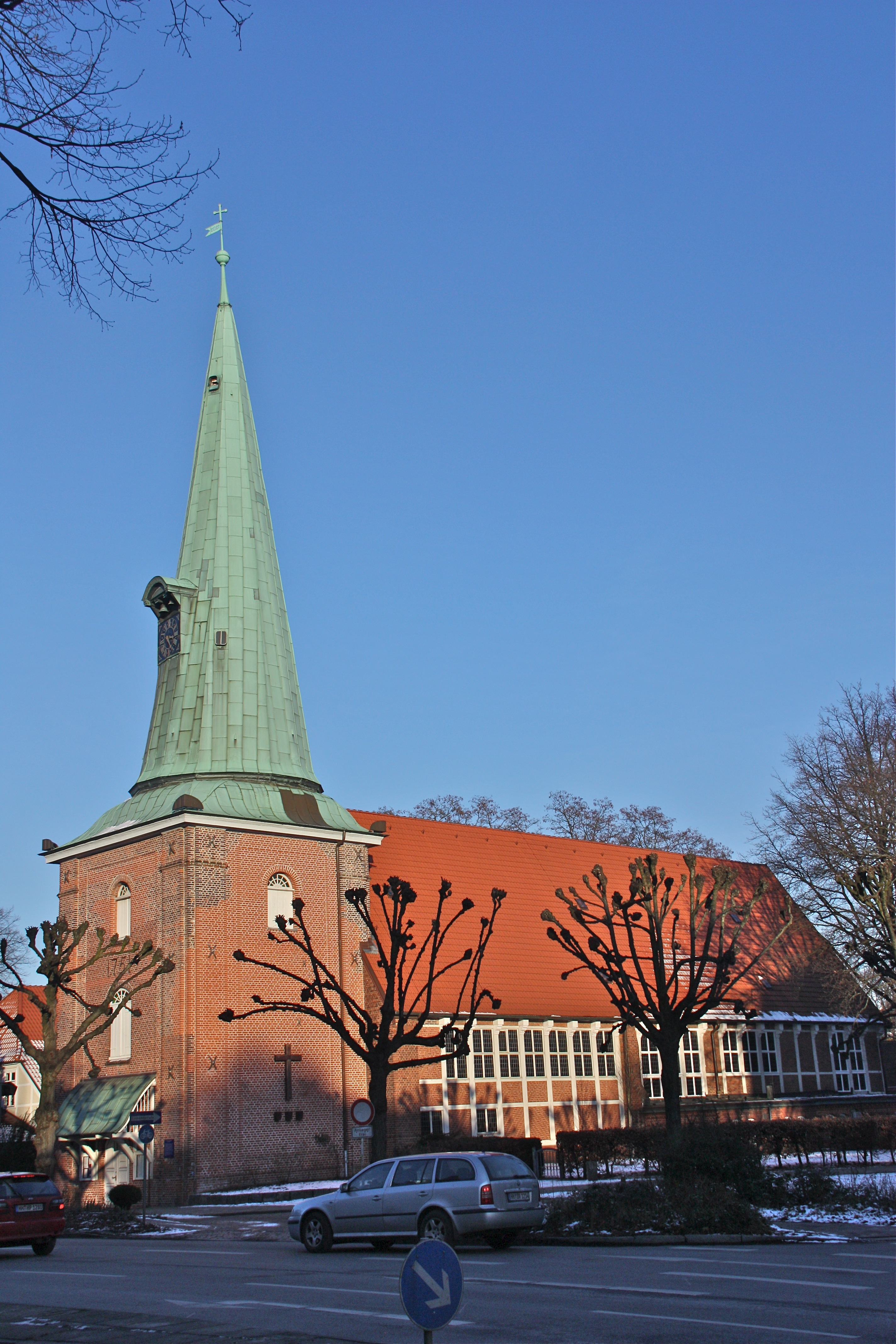 Hamburg, Eppendorf, Kirche St. Johannis, Außenansicht von der Kellinghusenstraße